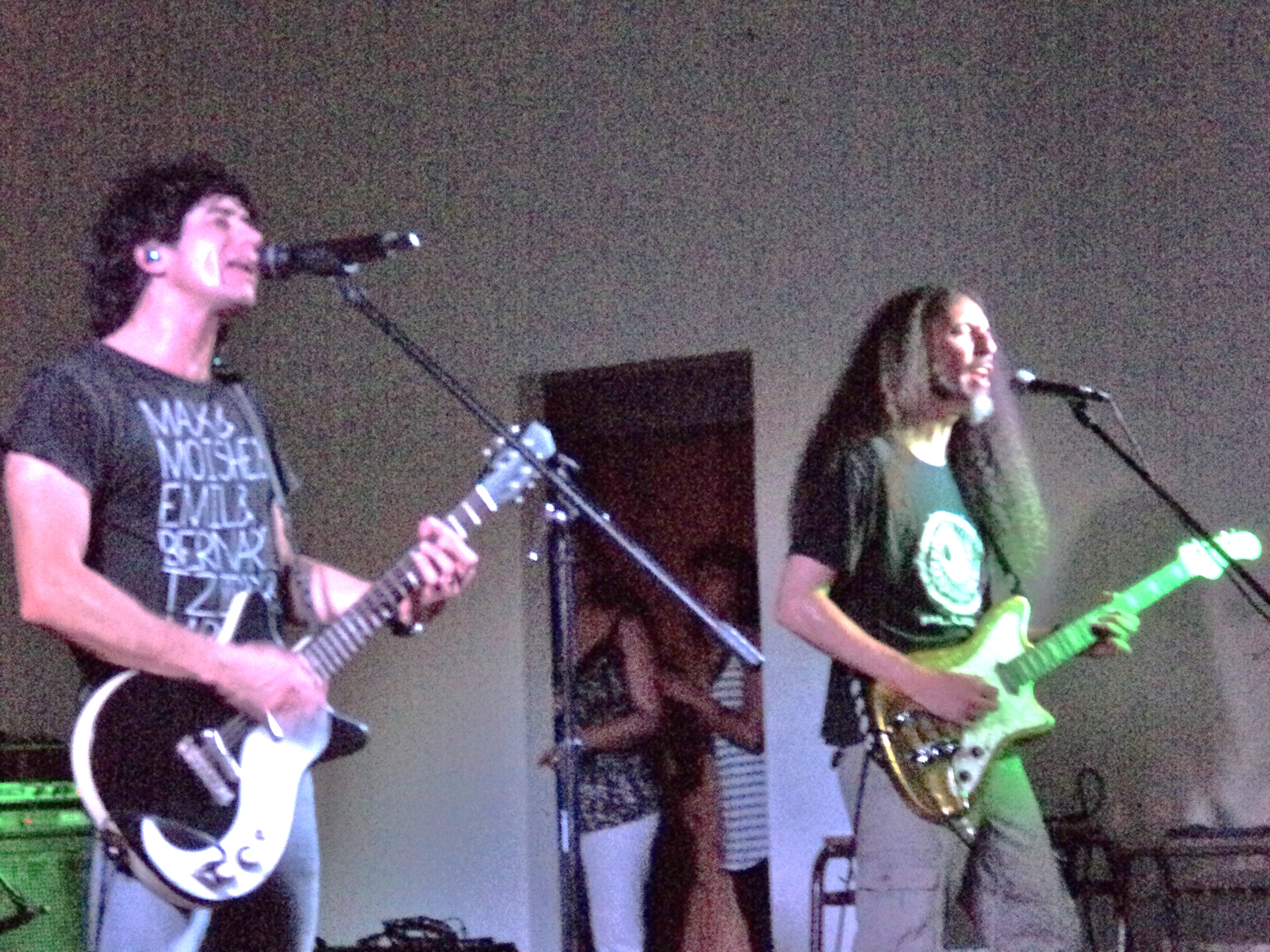 ulises voz de la banda y el guitarrista de rescate